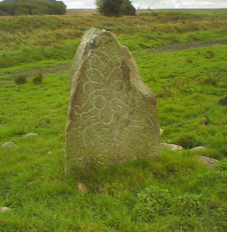 Sjellebrostenen, (Lime Sogn - Sønderhald Herred - Randers Amt) Denmark